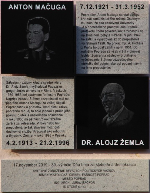 Pamätná tabuľa Antonovi Mačugovi a Dr. Žemlovi-Poprad